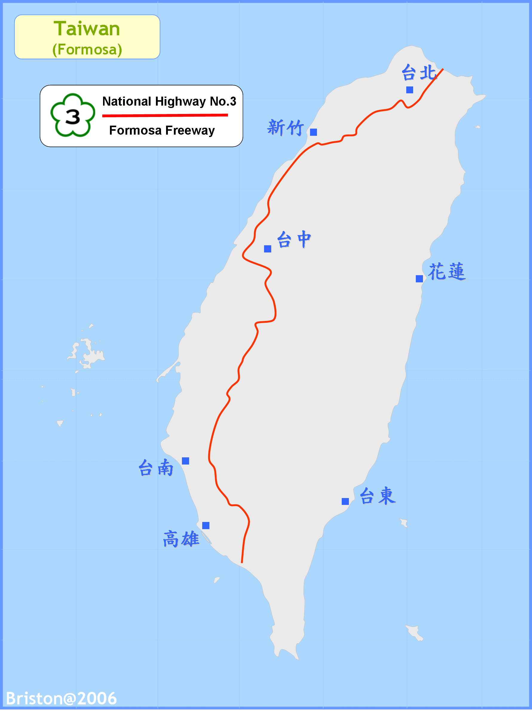 Taiwan_National_Highway_No_3